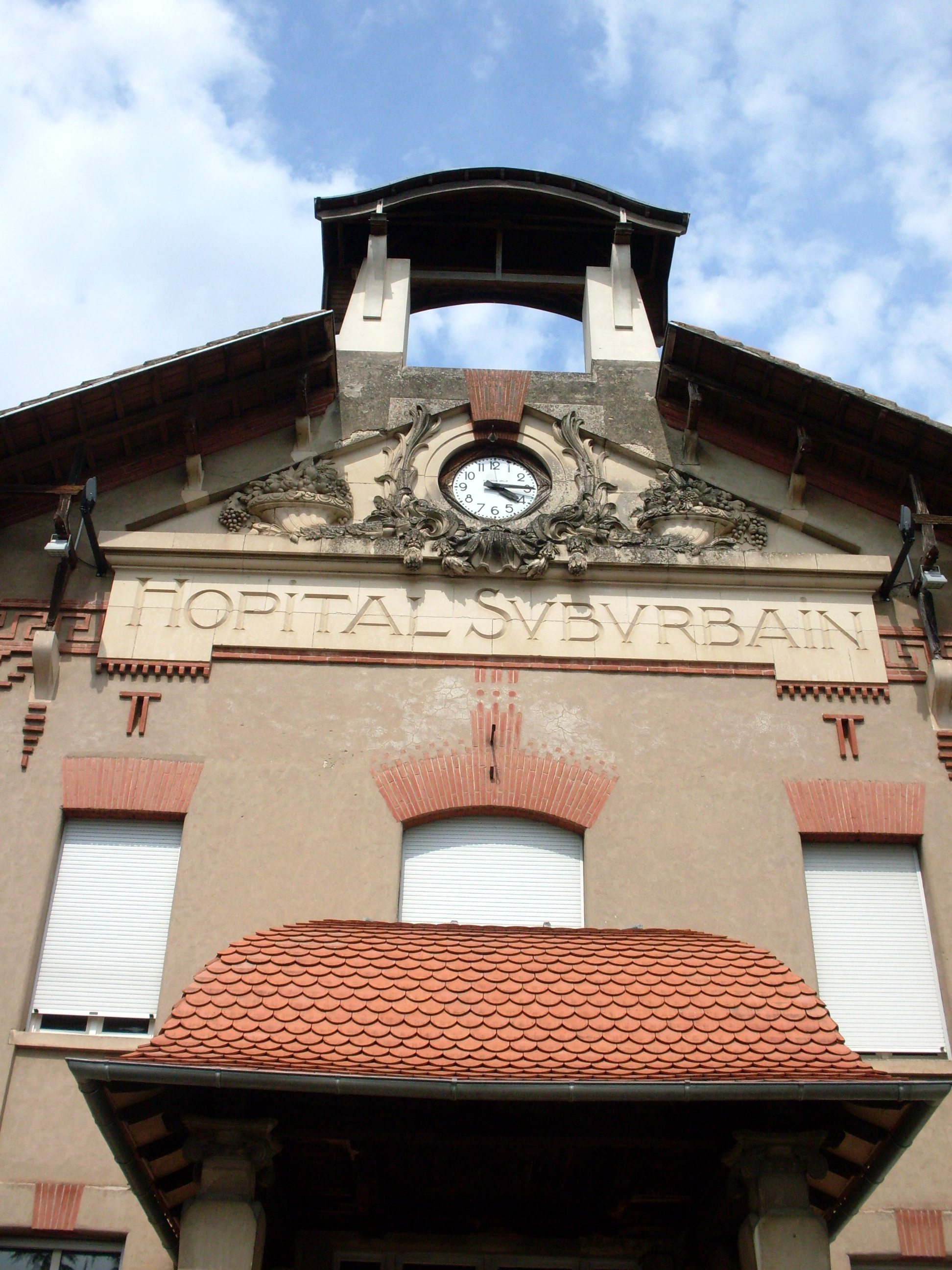 Détail de la façade du pavillon central de l’hôpital Purpan, inauguré en 1940. Toulouse, Haute-Garonne, France